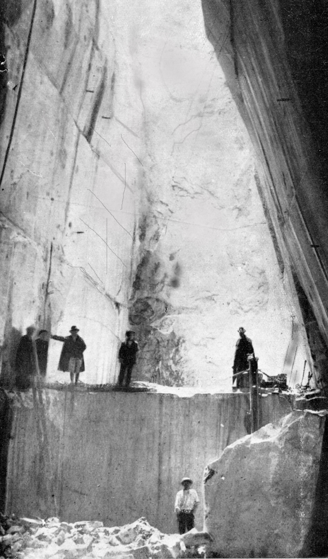 La fossa degli angeli regia di Carlo Ludovico Bragaglia - foto scena cava di marmo Alpi Apuane -produz. Diorama Roma - 1936